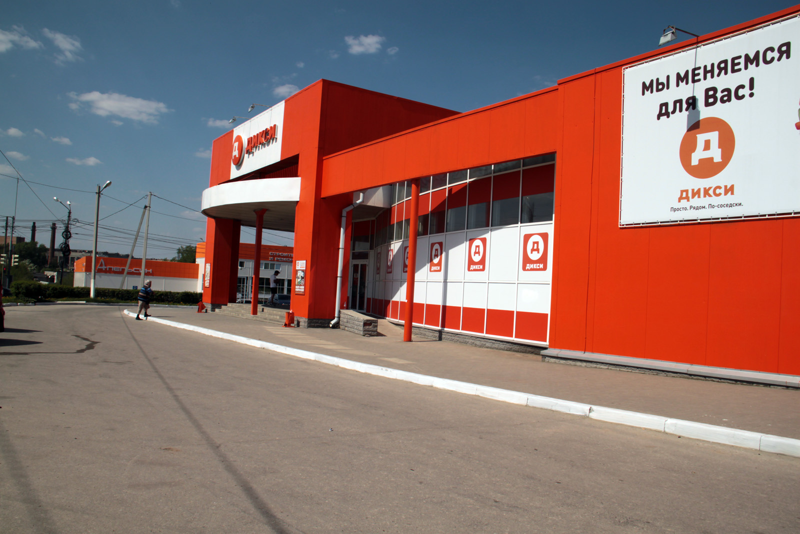 Магазин Дикси в Рязани, на ул.Зубковой